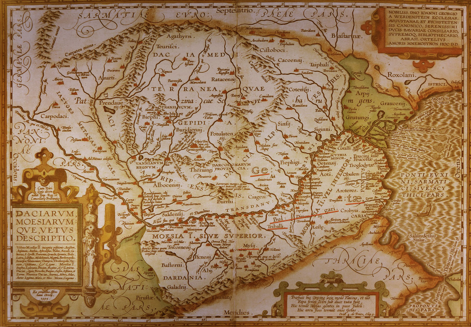 Карта на Балканите от 1595 г. на картографа Абрахам Ортелий. Означени са земи на мизи, даки, гети, българи, трибали и др.